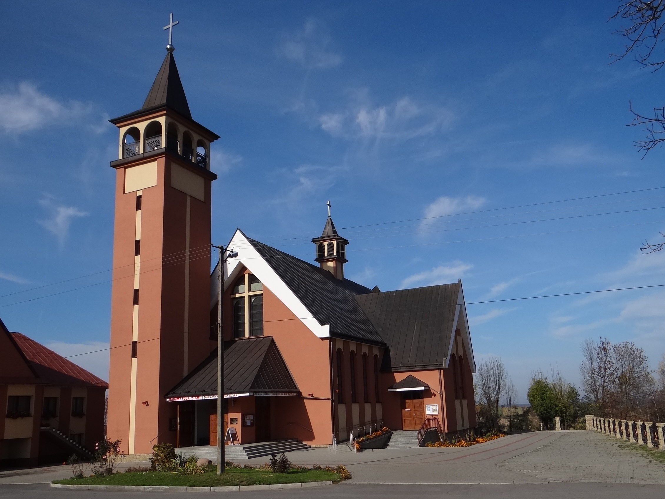 Kościół w Gierczycach